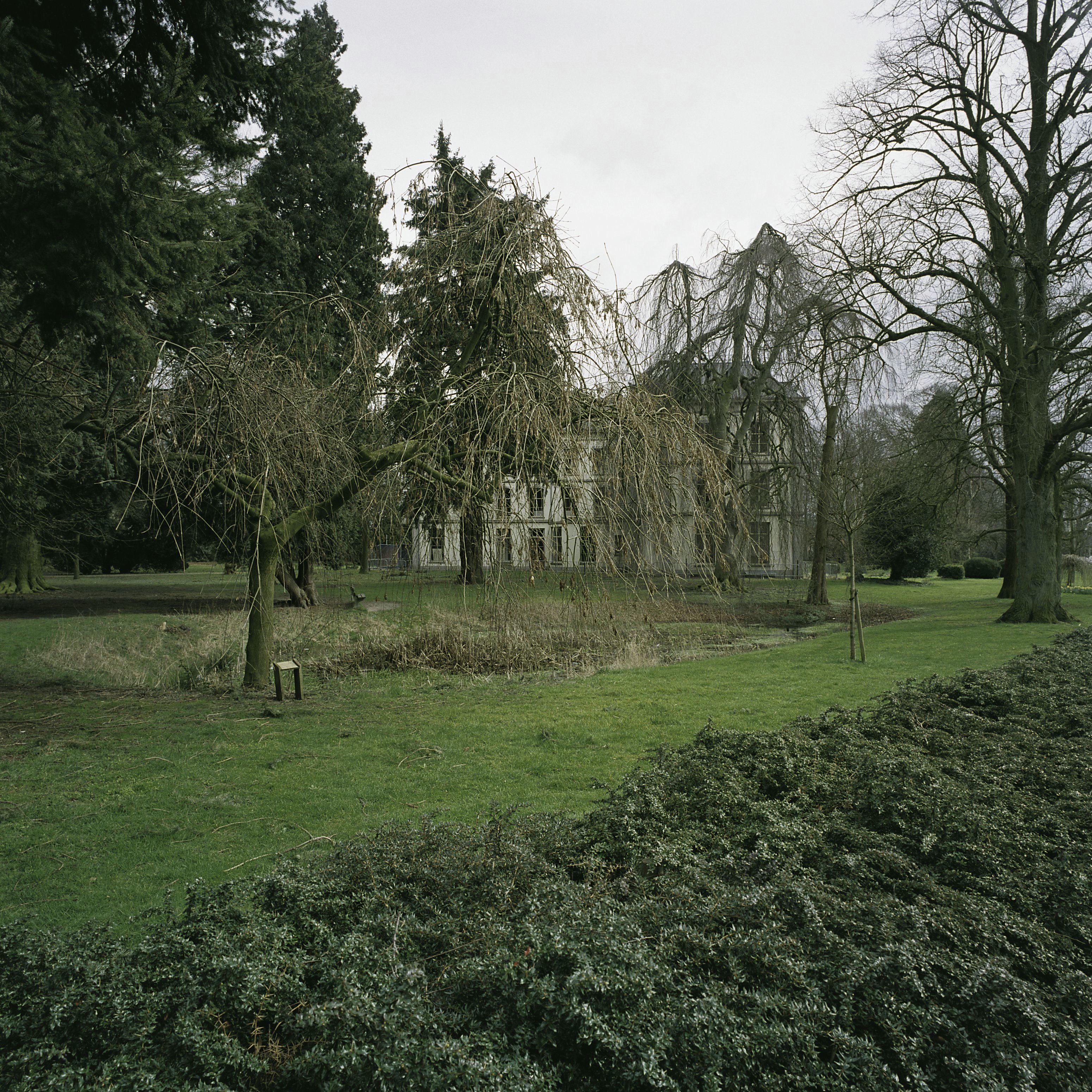 Villa Ruimzicht: Arboretum rondom villa